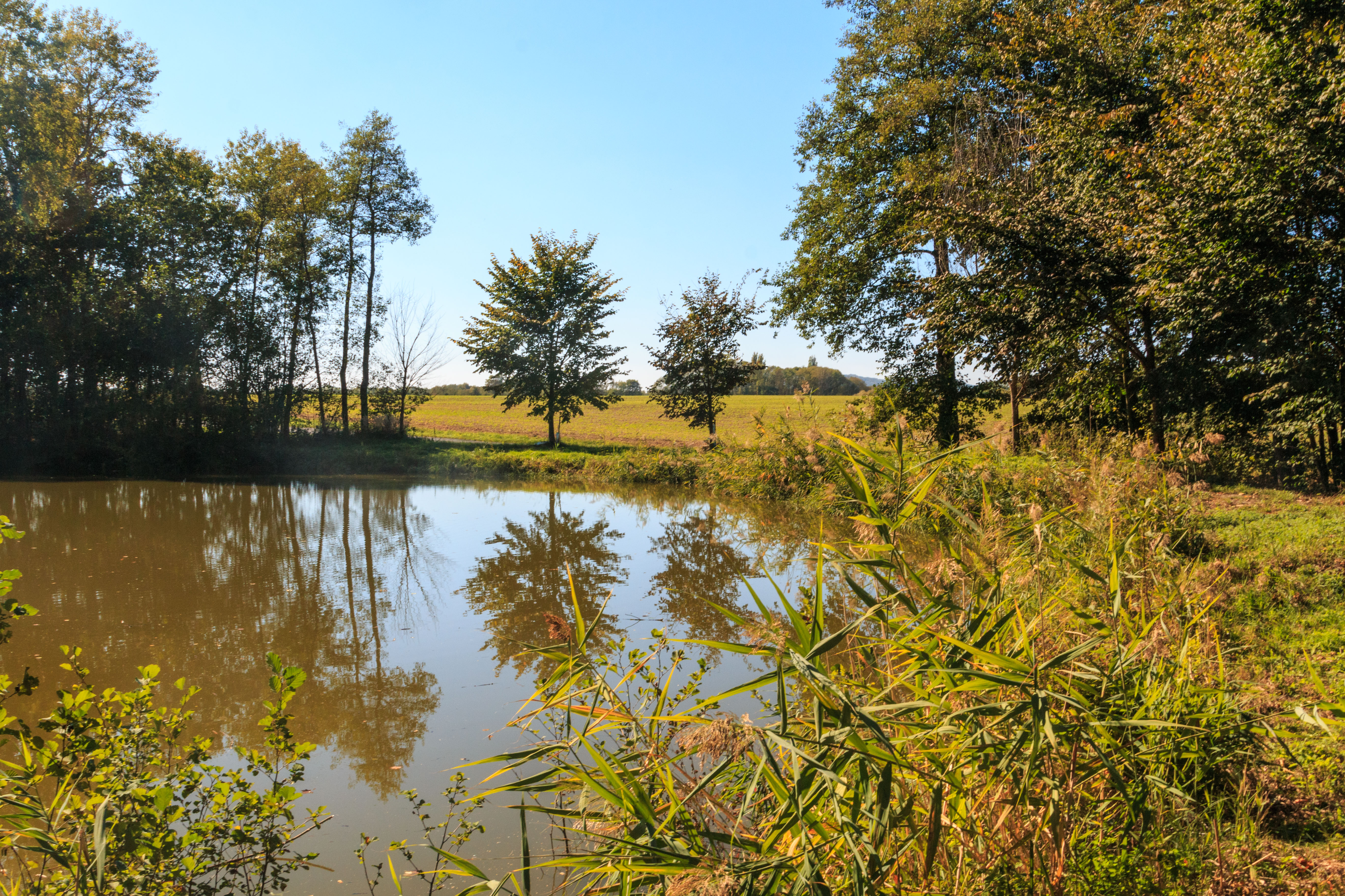 Rybník Havránek u Kněžmostu Project: Vodstvo.